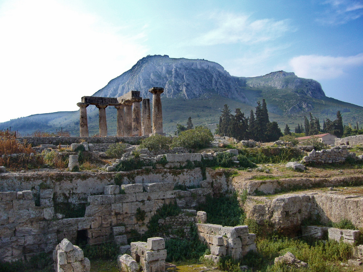 Коринф